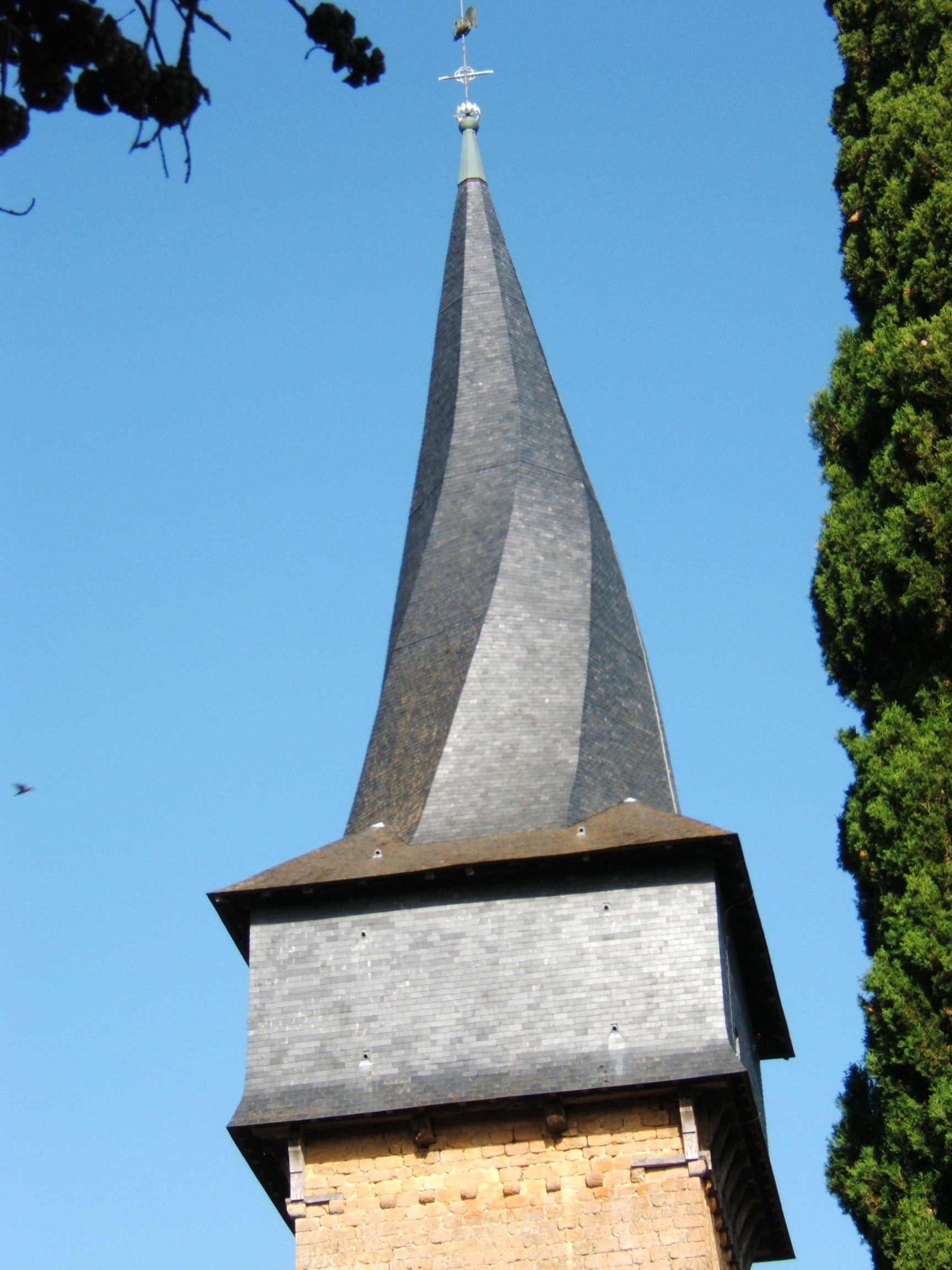 le clocher tors de la collégiale Sain Jean-Baptiste de Barran dans le Gers (France)